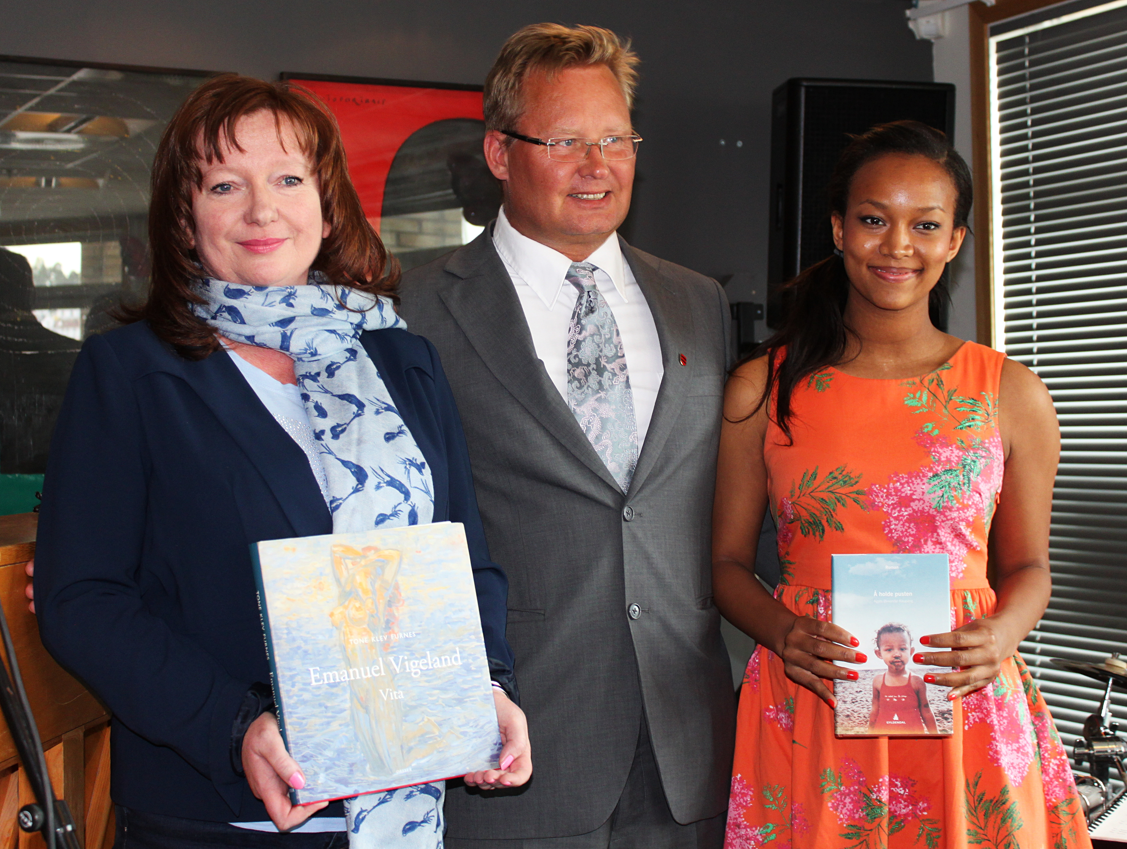 Vinnerne av Sørlandets litteraturpris 2014, Tone Klev Furnes og Agate Øksendal Kaupang sammen med fylkesordfører Bjørgulv Sverdrup Lund.